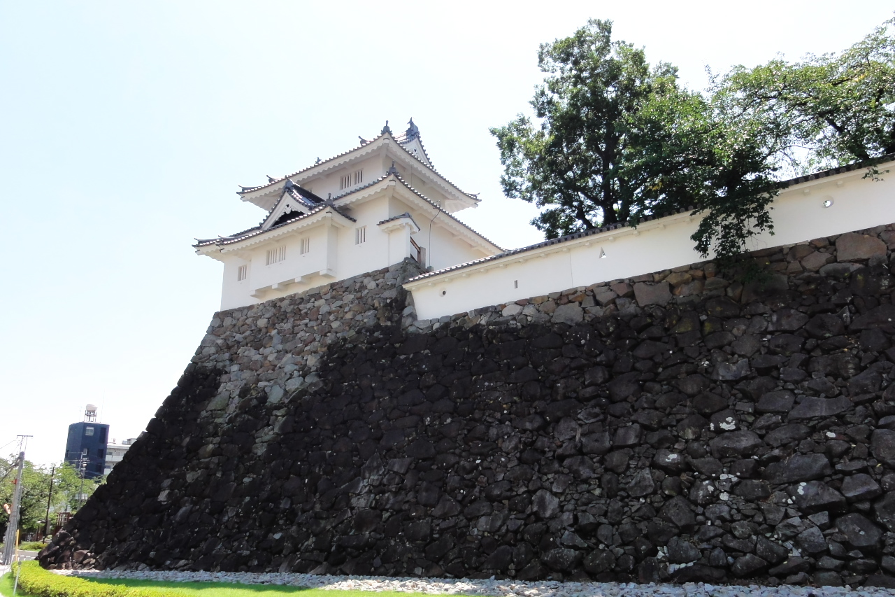 甲府駅からも見える甲府城、別名舞鶴城です。